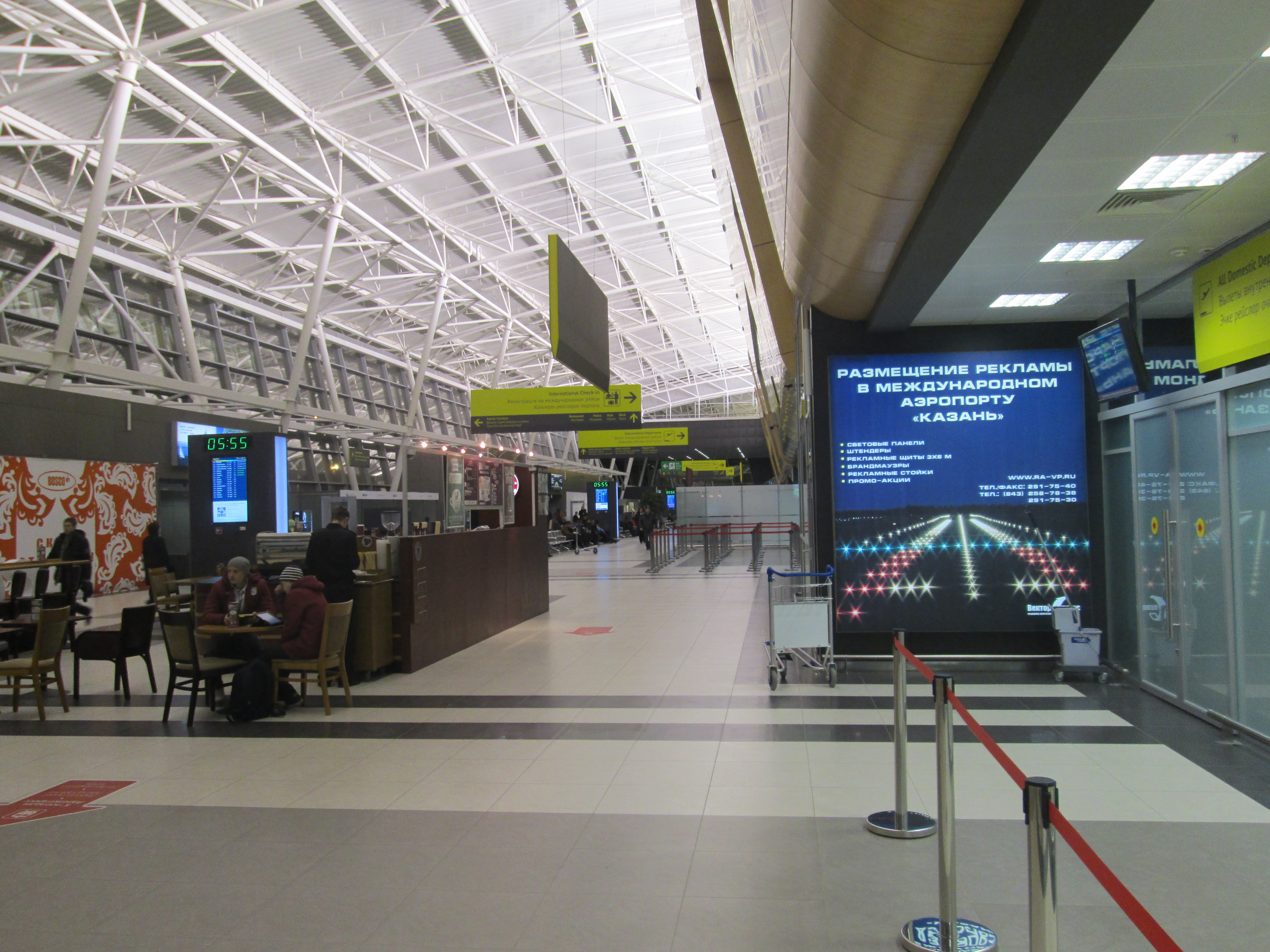 казанский аэропорт внутри